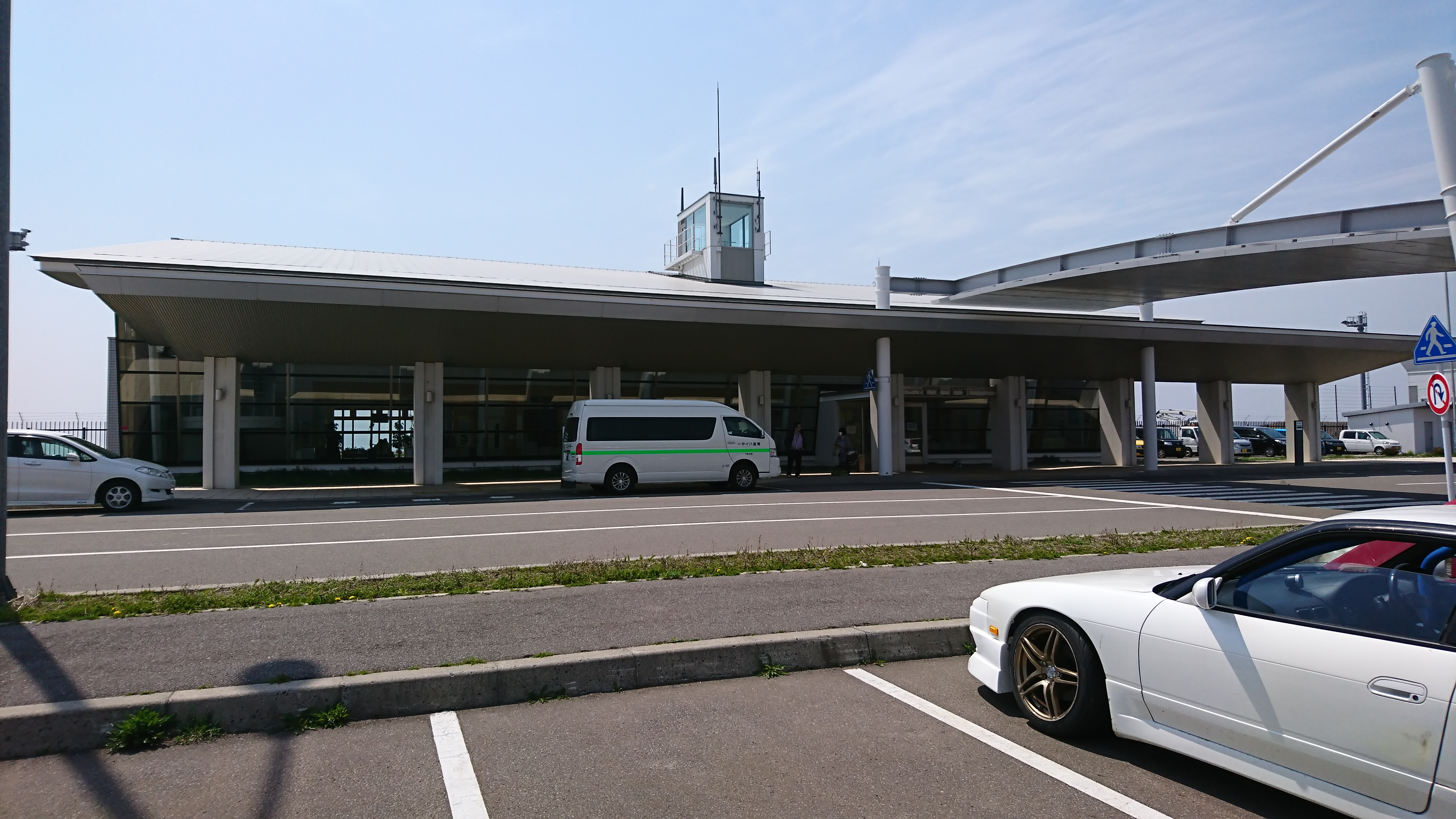 奥尻空港ターミナルビル外観